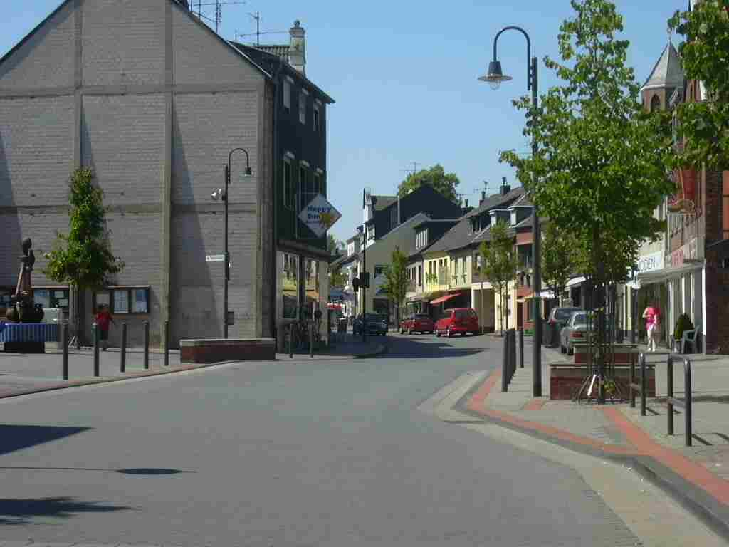 Langerwehe Ortskern Own Work papa1234 2006-07-14